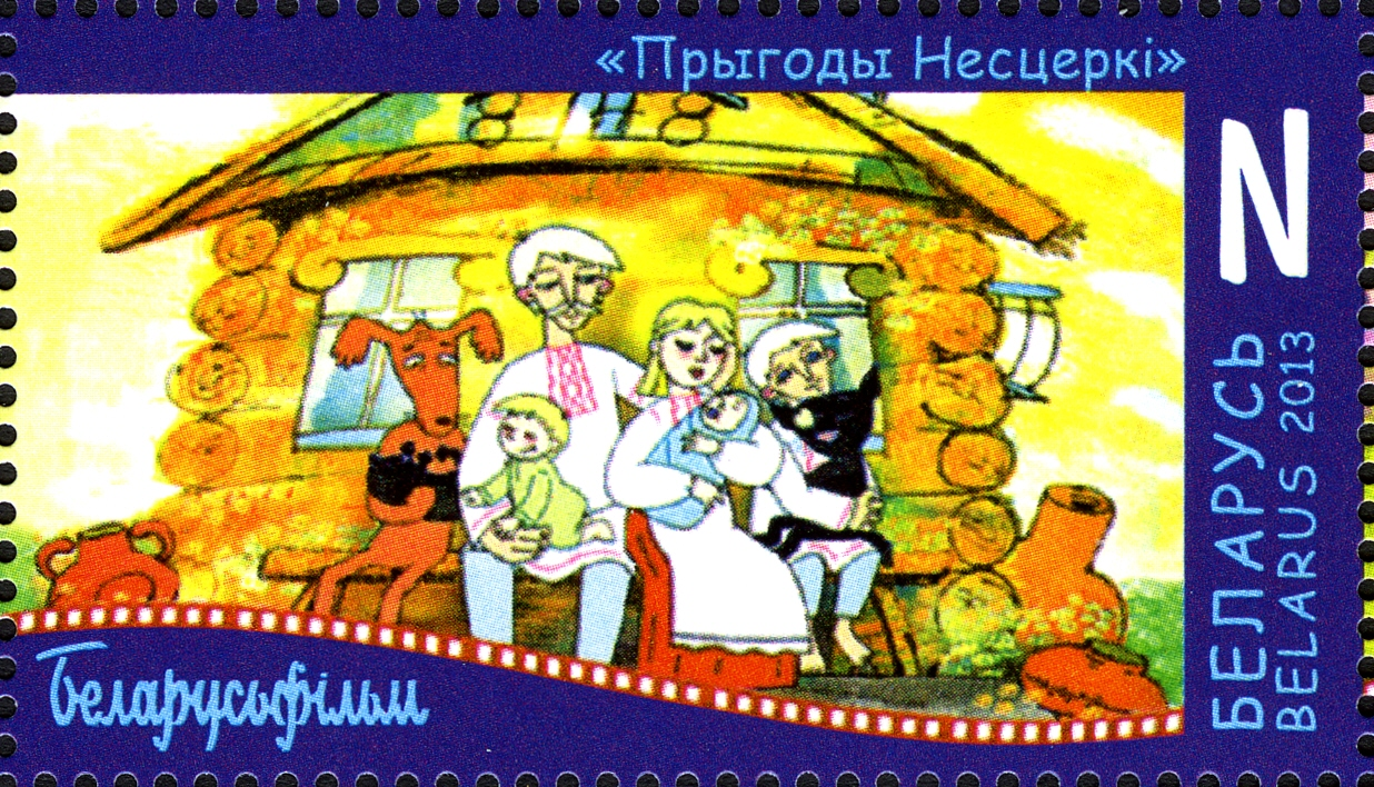 Беларускія анімацыйныя фільмы